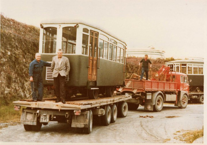 Trasferimento delle ex vetture della Guidovia della Madonna della Guardia (Genova) a Piacenza